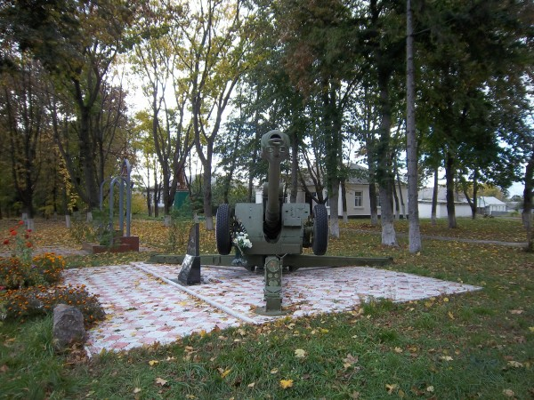 Пам’ятник воїнам-афнацям